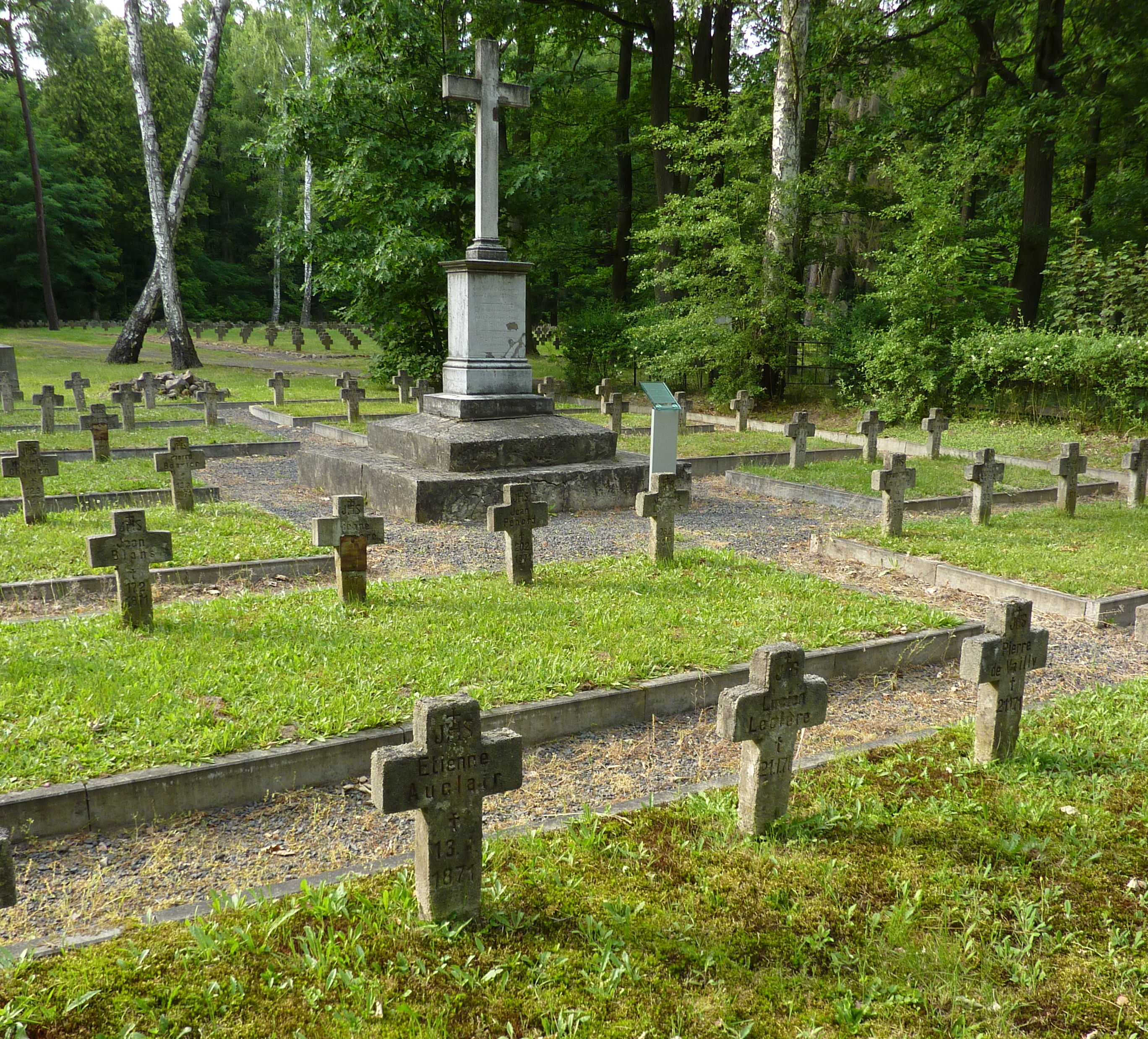 Kwatera francuska z pamiątkowym pomnikiem na Starym Cmentarzu Jenieckim w Łambinowicach